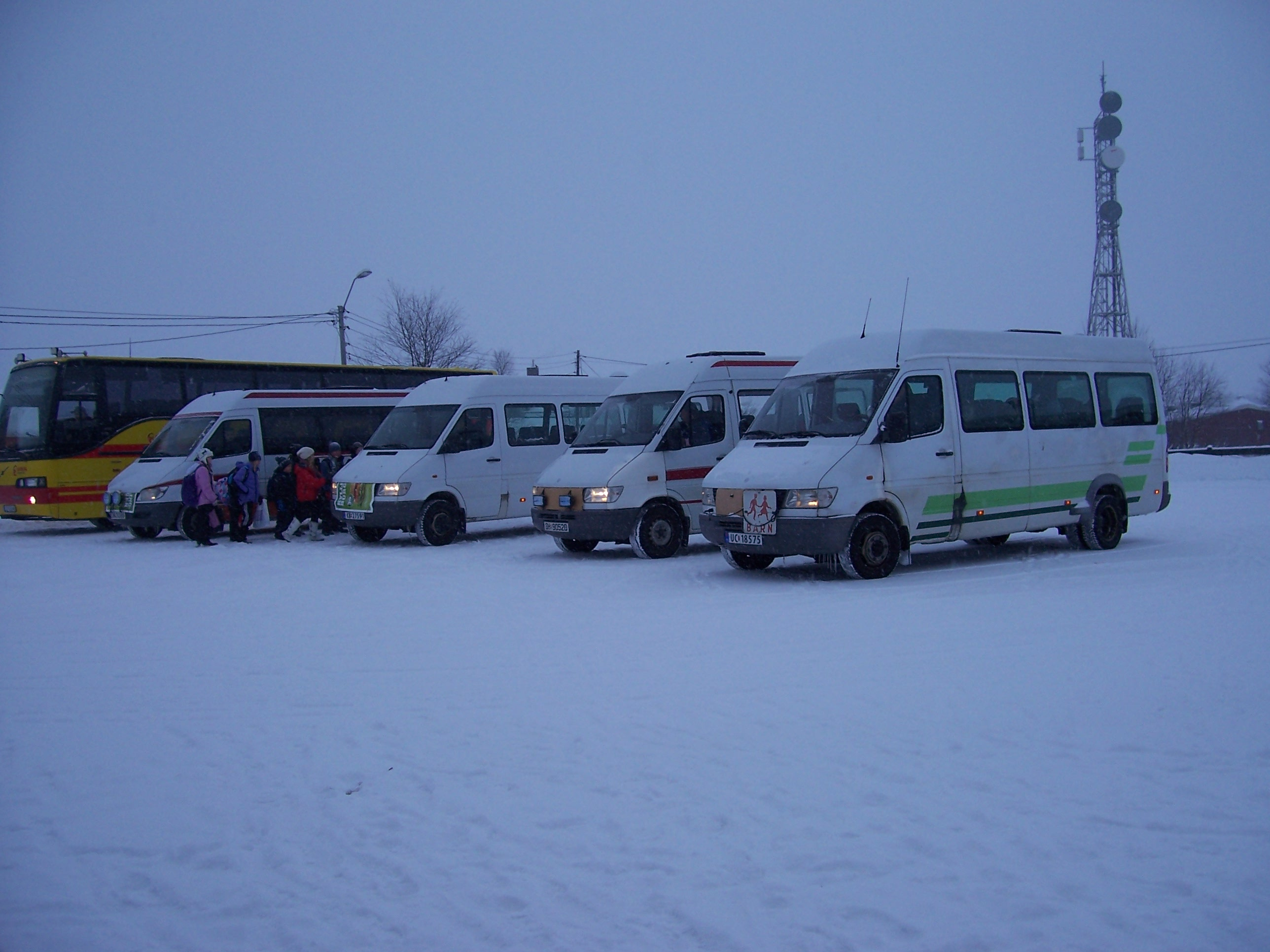 Skolebusser i Kautokeino